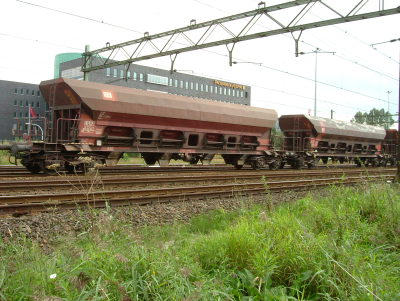 Een goederenwagen van het type Facs. © Bastaan Luytjes